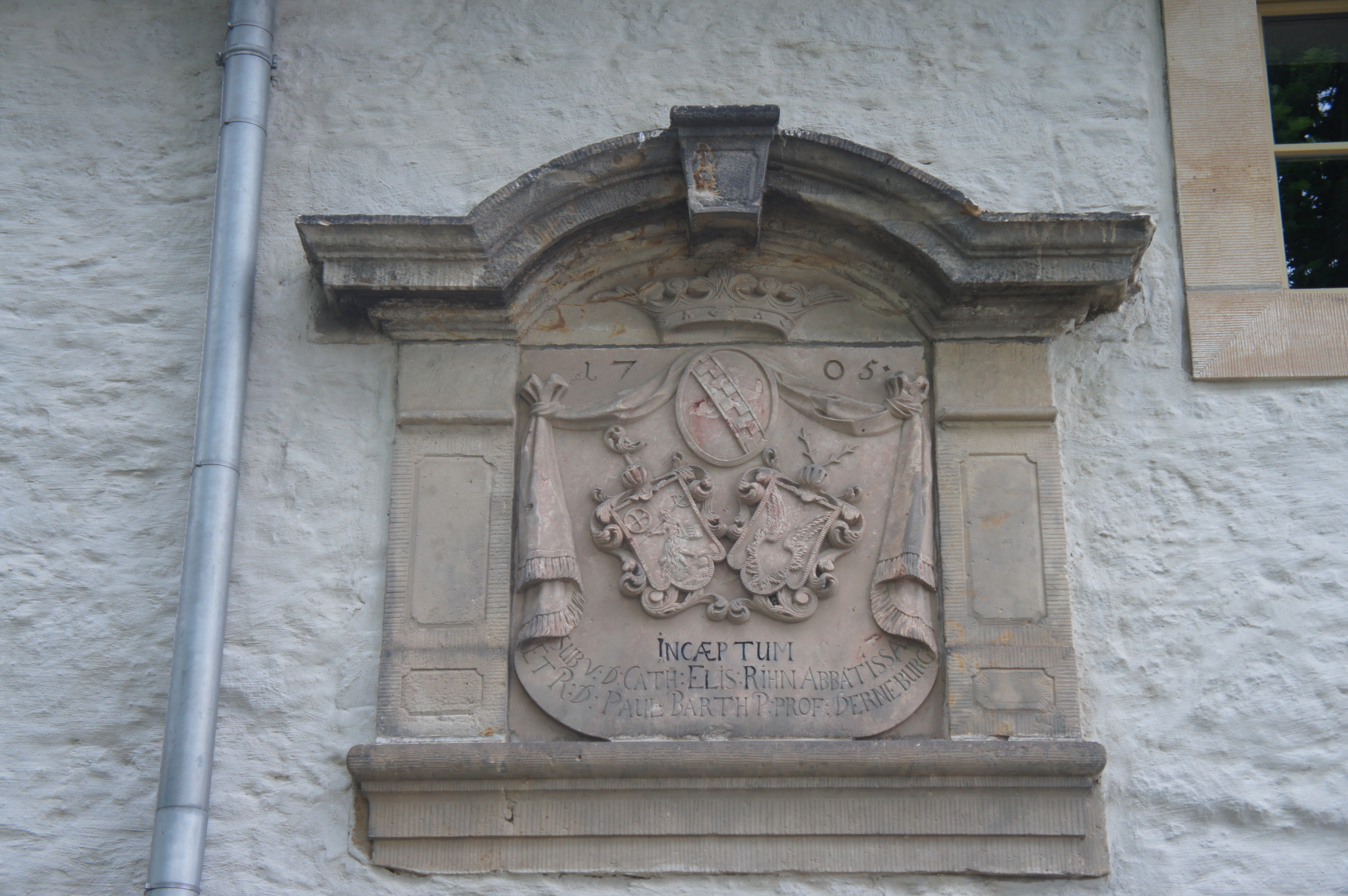 Kloster St. Gertrudis in Hedersleben; 1253 gegründetes Kloster des Zisterzienser-Ordens